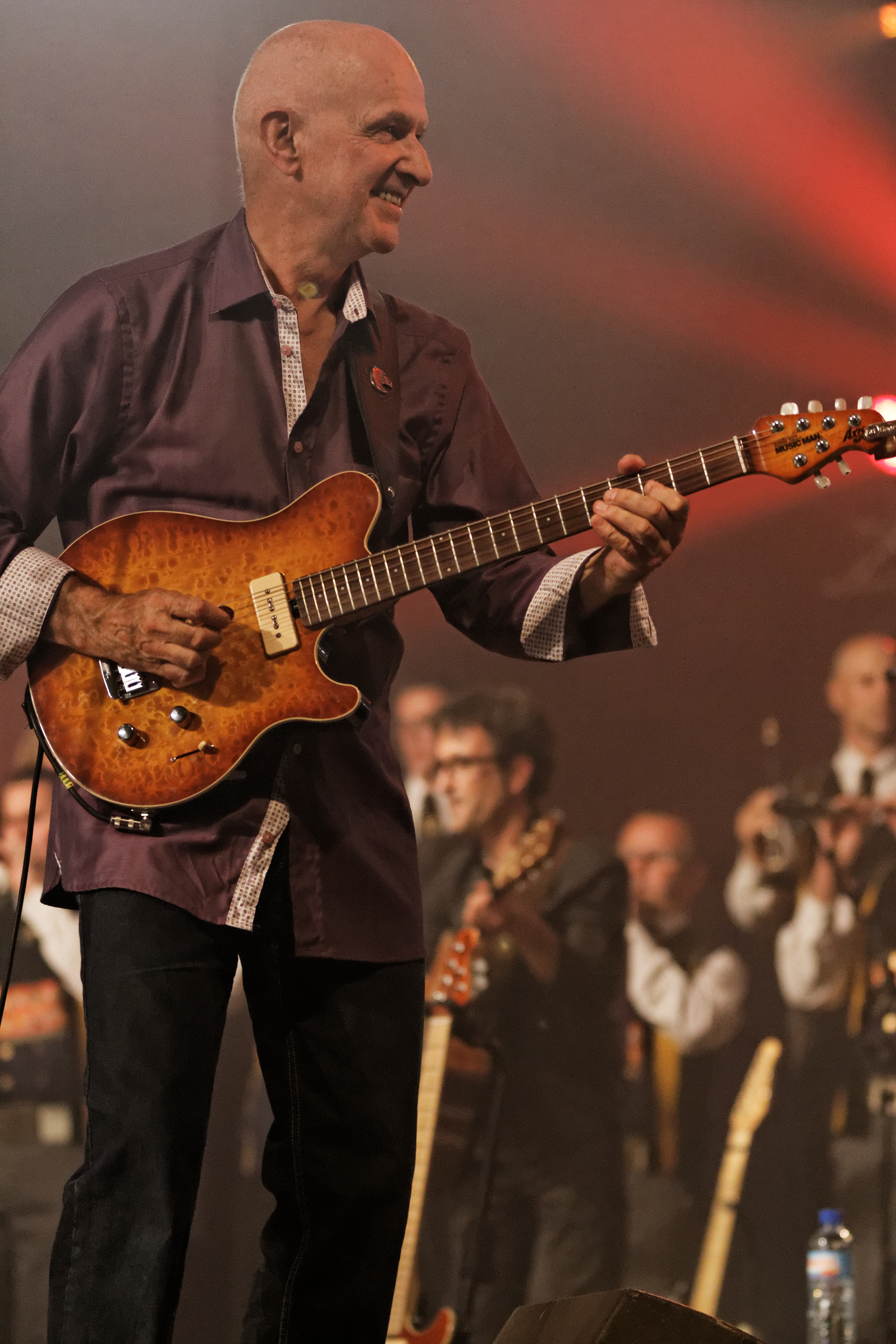 Dan ar Braz en concert sur la scène Gradlon lors du festival de Cornouaille 2013.